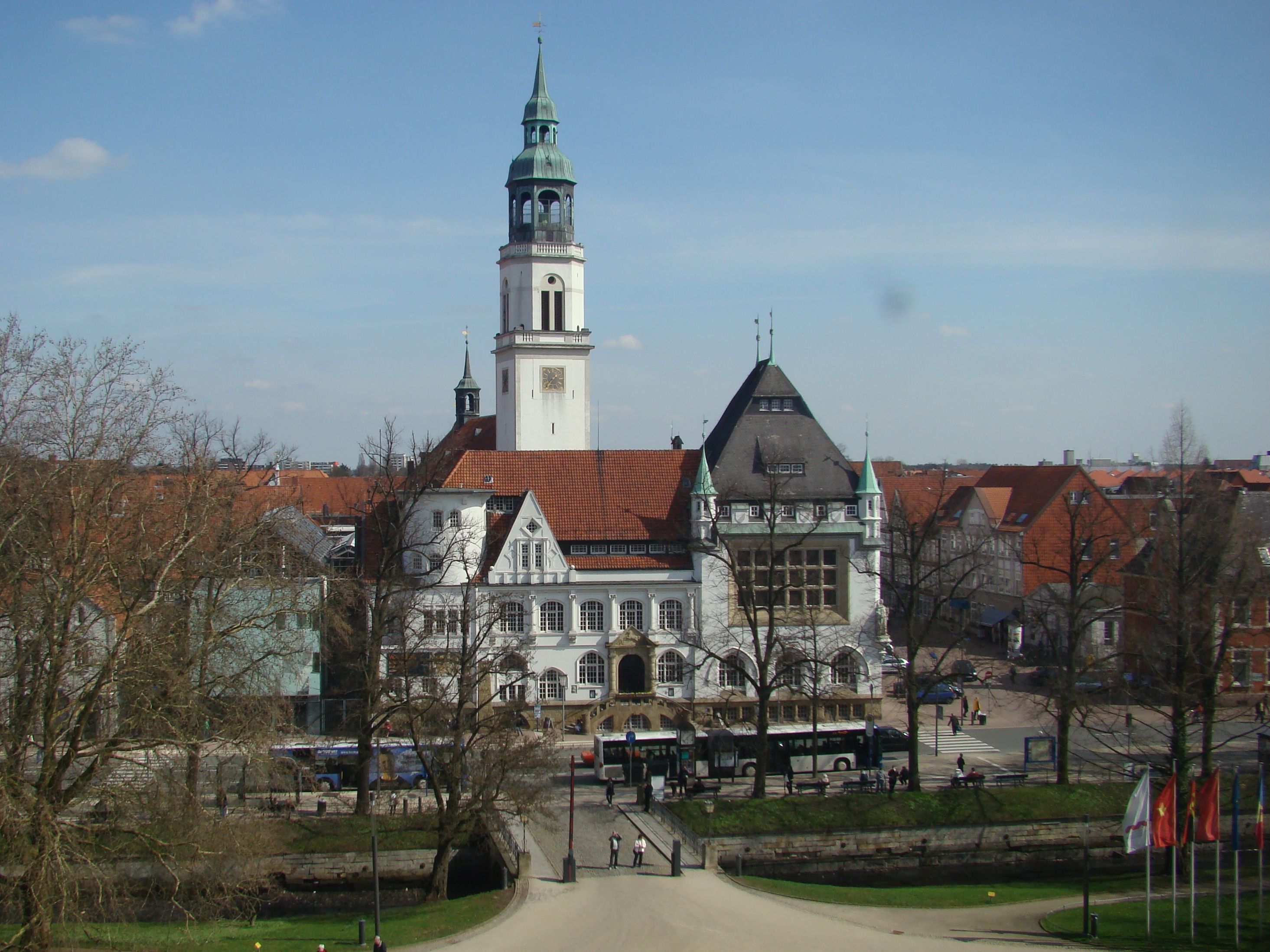 Das Bomann-Museum, Celle, dahinter die Stadtkirche St. Marien